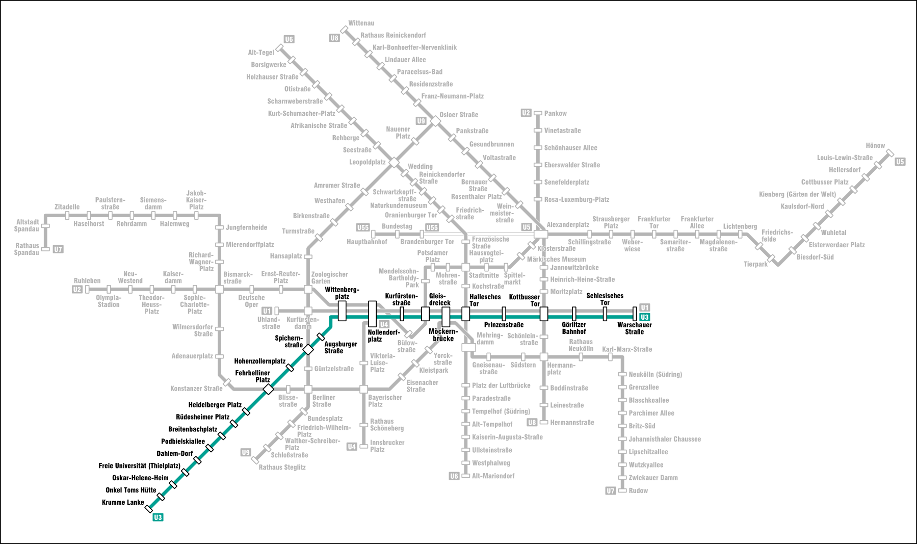 Karte der Linie U3 der U-Bahn Berlin.